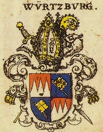 Wappen des Bistums Würzburg nach Siebmachers Wappenbuch